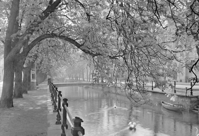 Potsdam.- Am Kanal